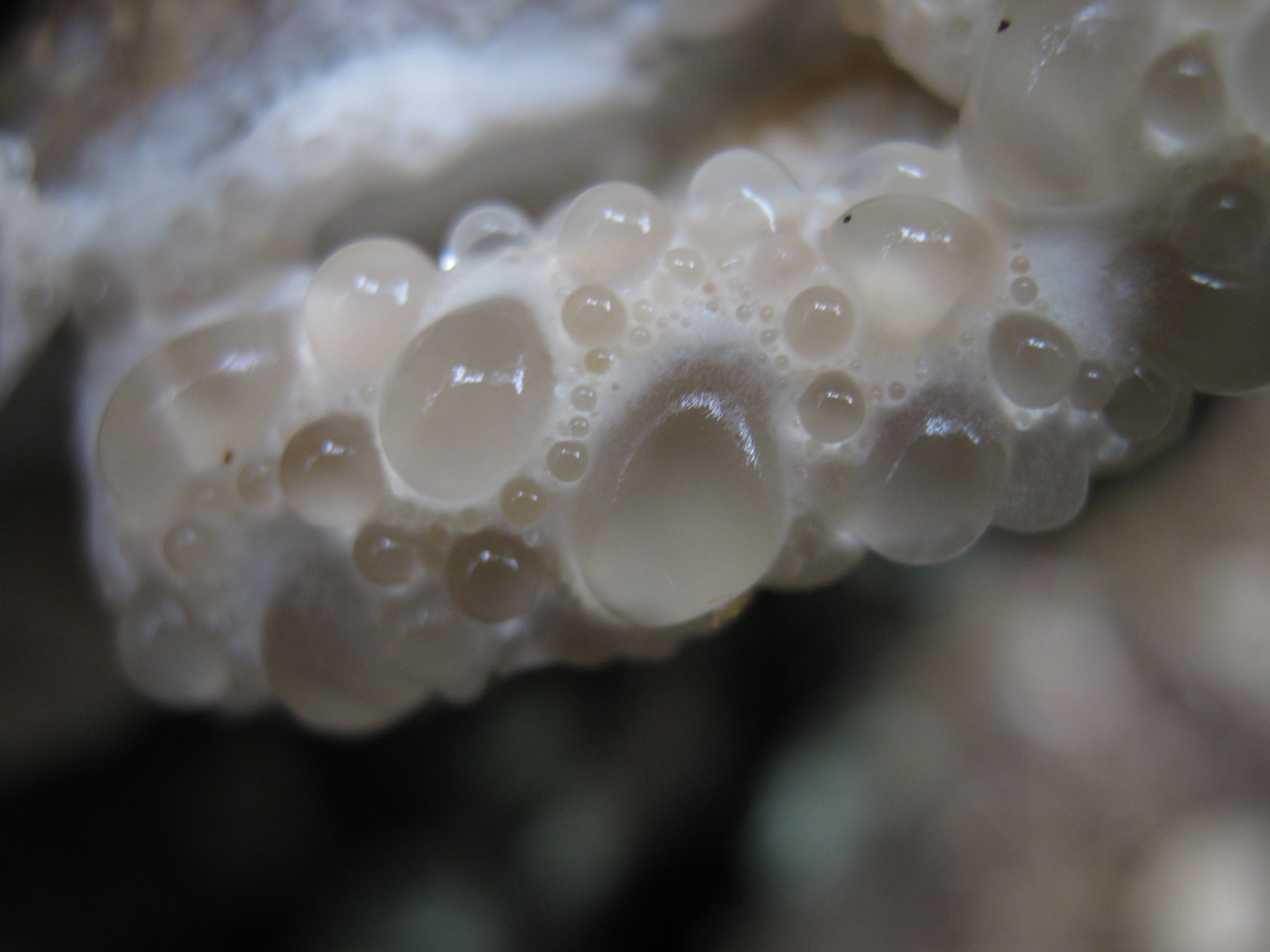 Oligoporus guttulatus